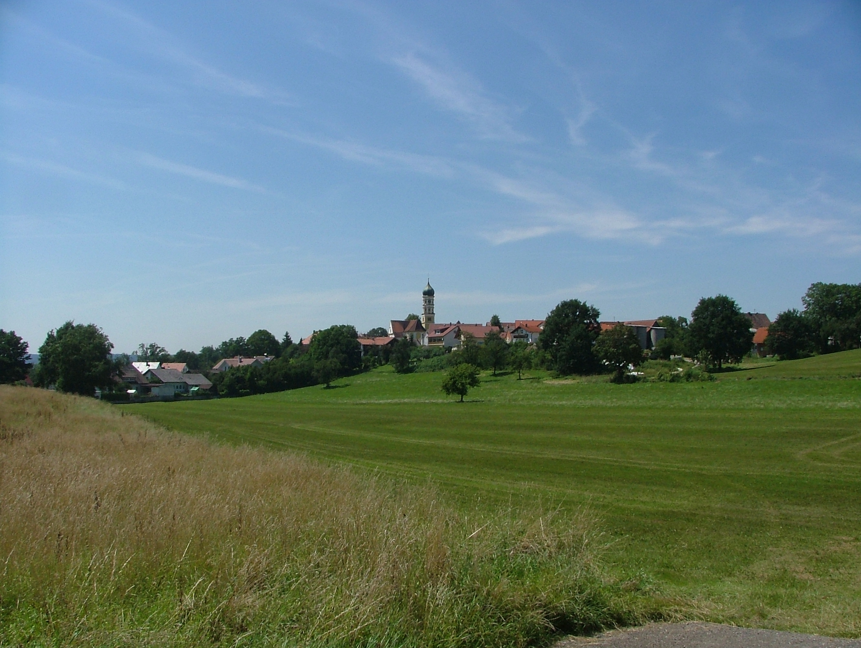 Kellmünz